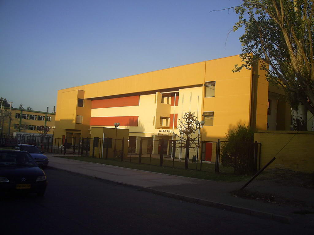 La nueva clínica anexada al Hospital Regional de Talca.